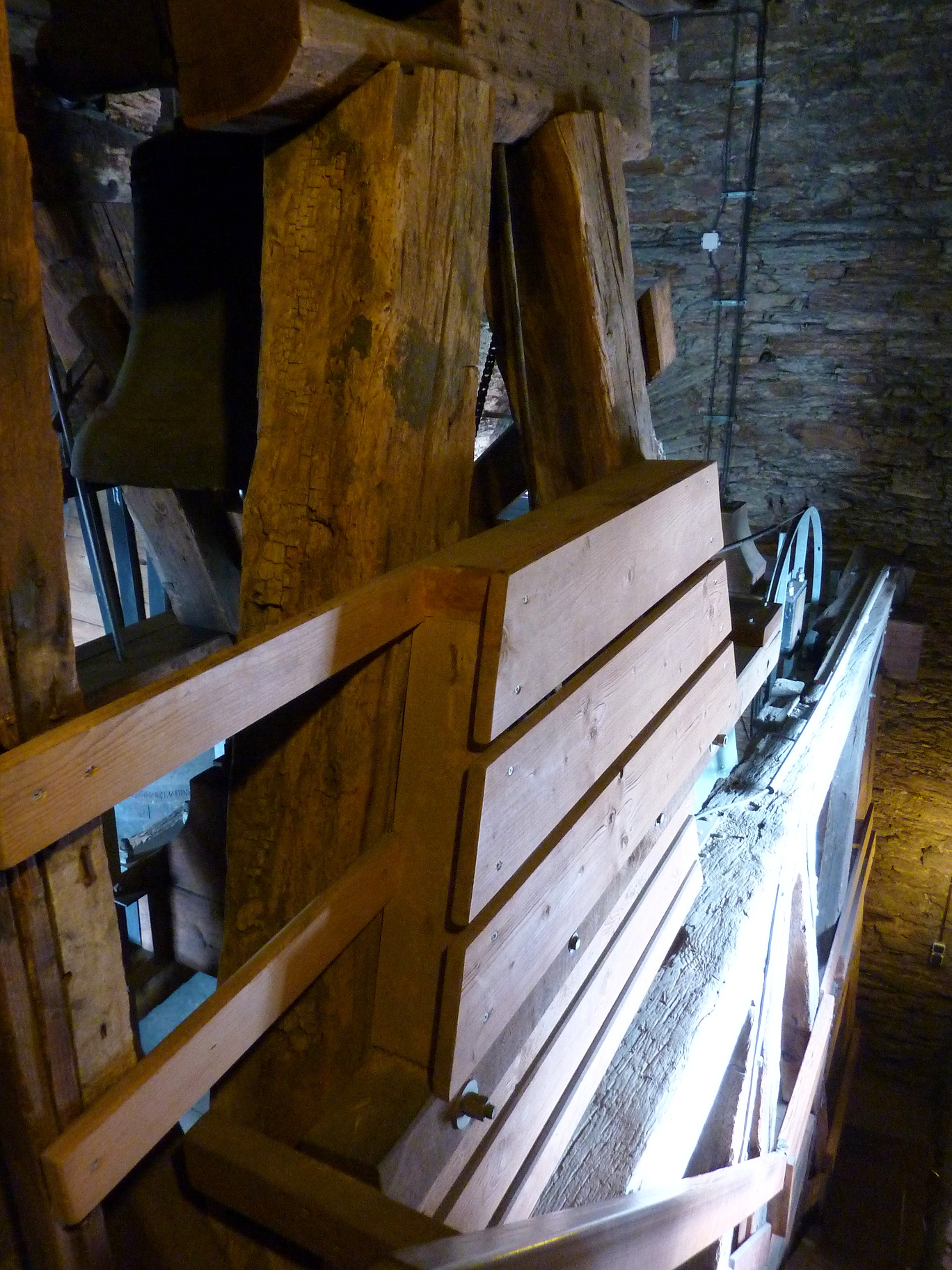 Evangelische Nikolaikirche in Siegen/Westfalen: Glockenstuhl im Turm